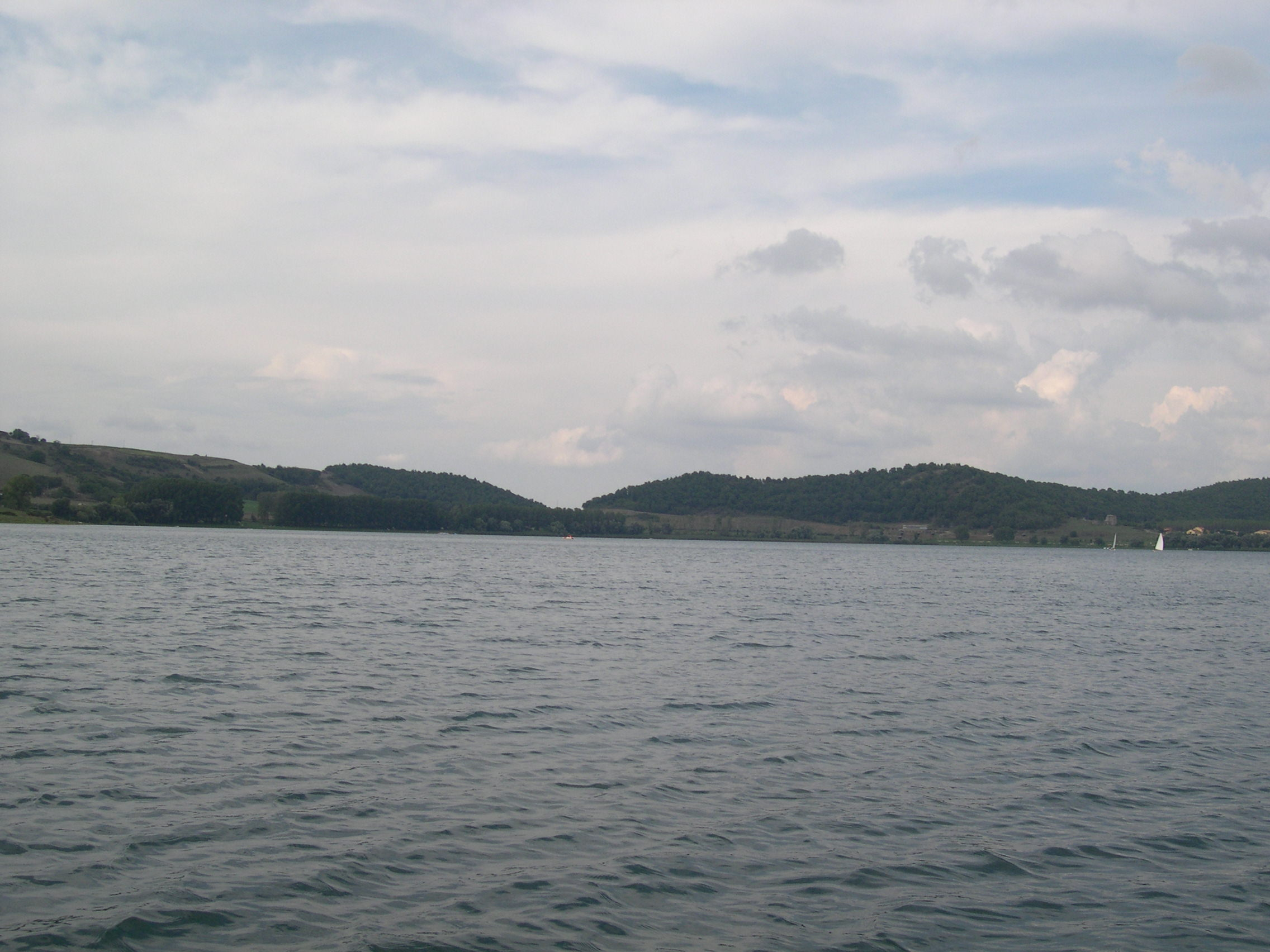 Lago di Martignano, Lazio